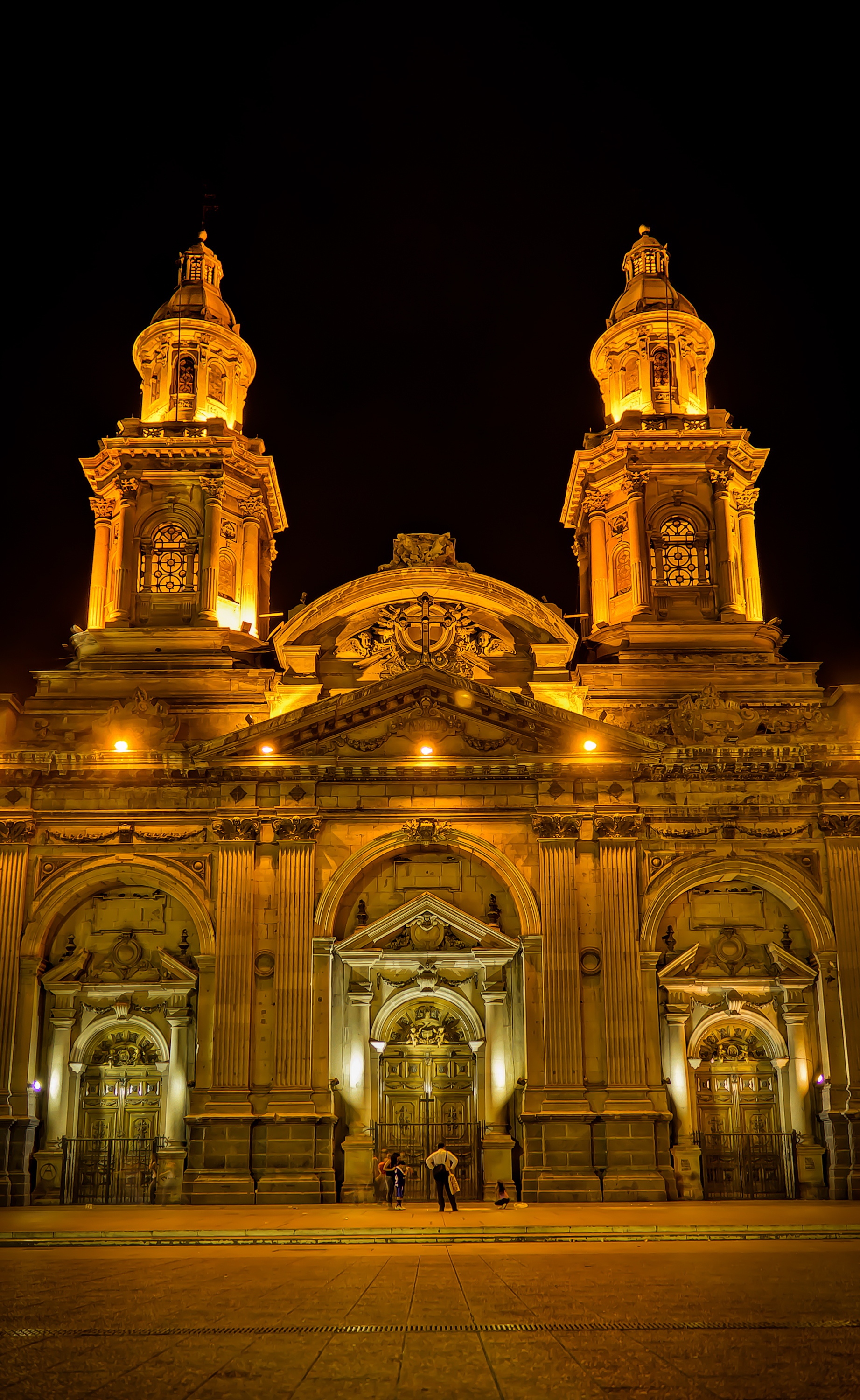 Vista de lado de la Catedral Metropolitana de Santiago